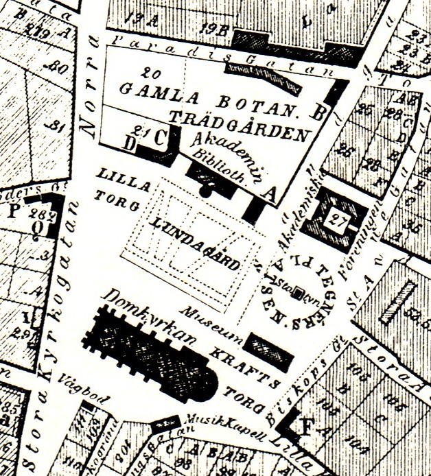 Map of Lundagård in 1866, cropped from Image:Karta öfver universitetsstaden Lund 1866.jpg